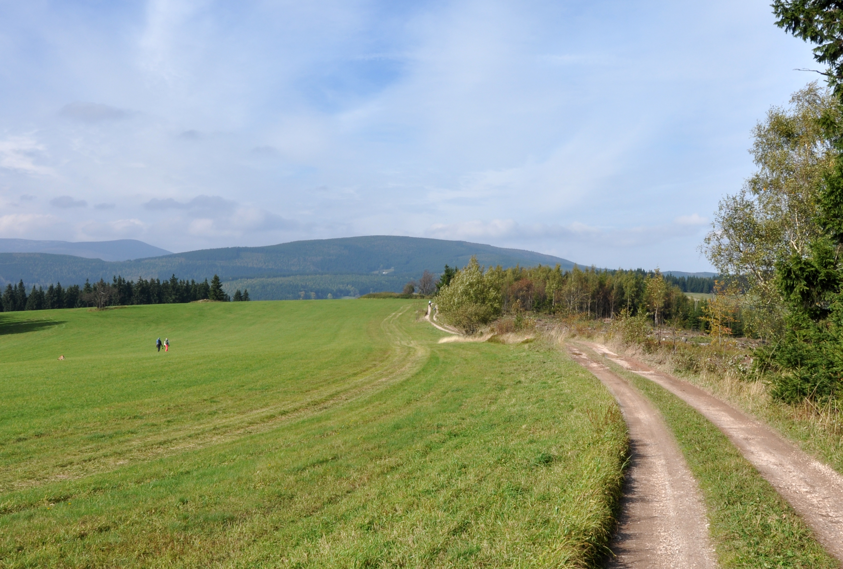 Polní cesta na Čepelu v Krkonoších